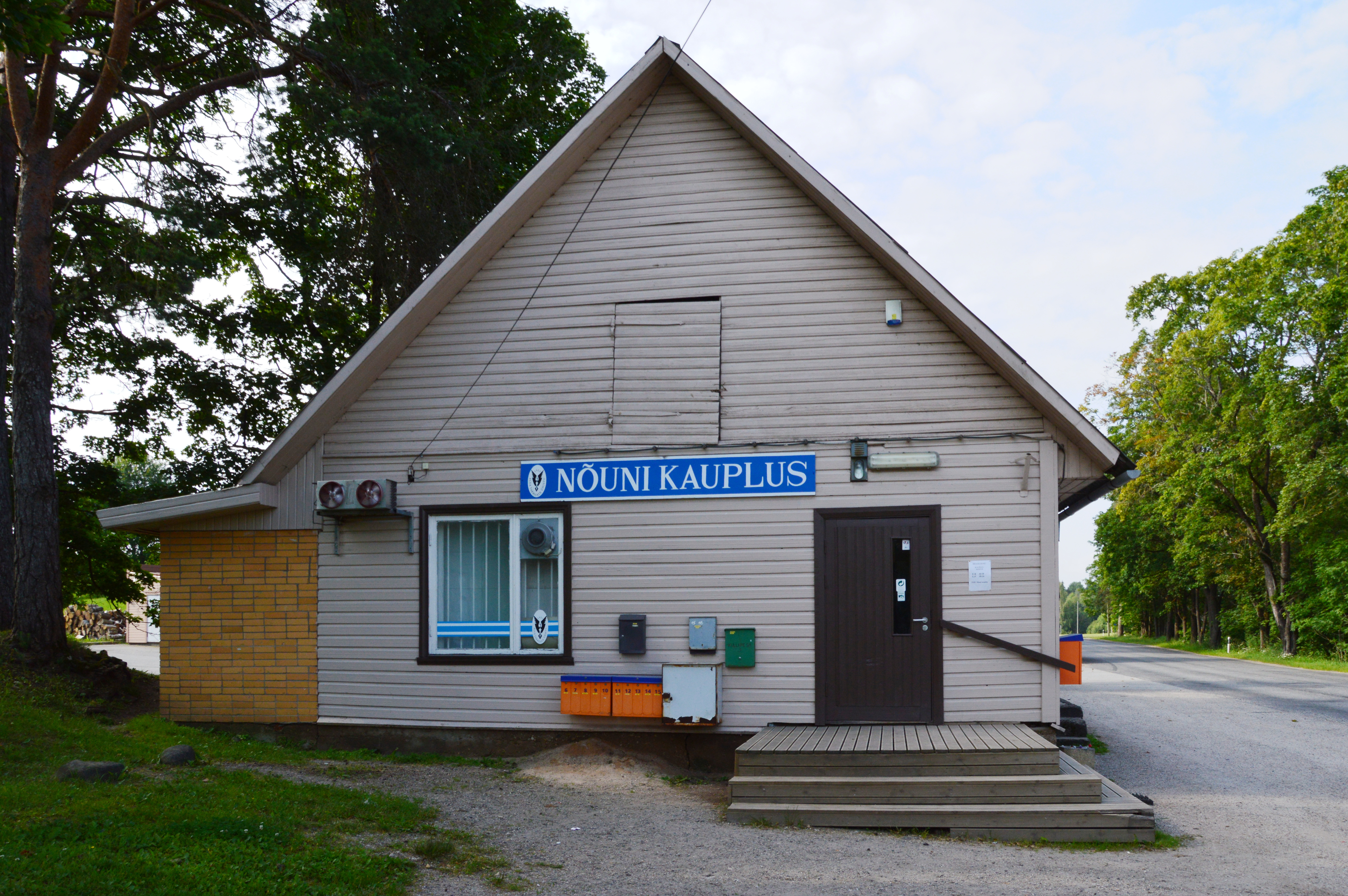 Nõuni kauplus